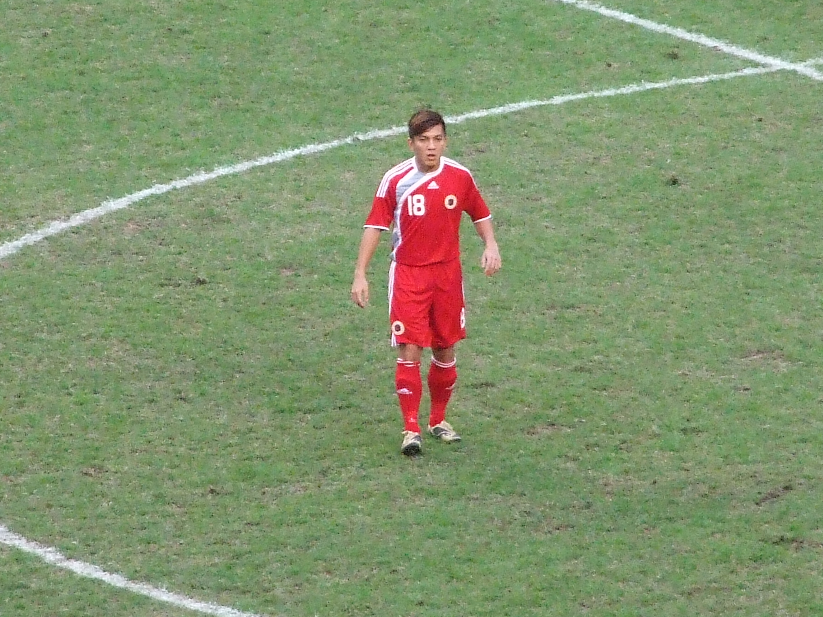 中文（香港）: 郭建邦